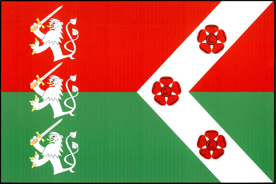 Vlajka obce Verušičky